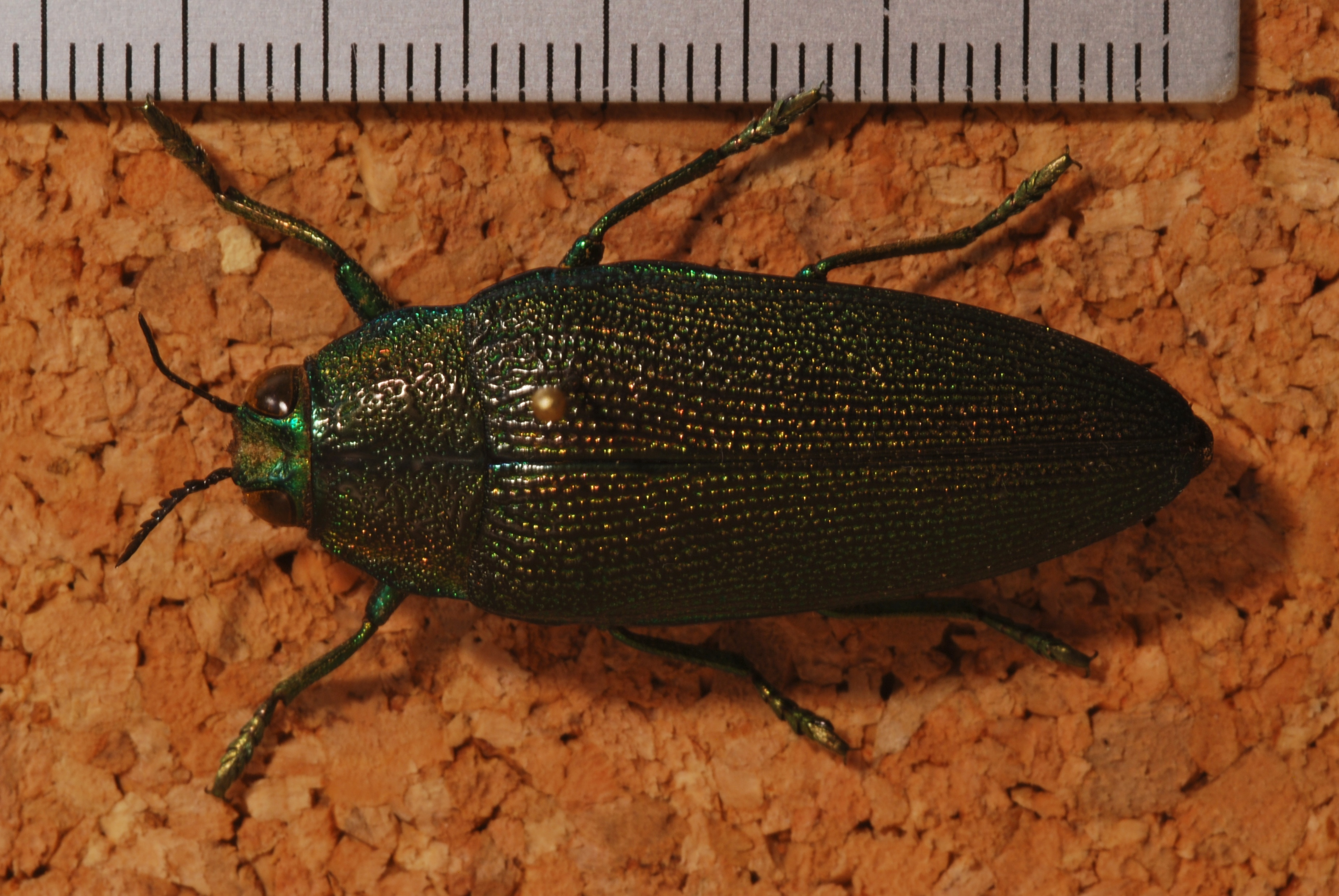 Kuma Forest, Kpalimé, TOGO